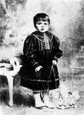 Уи́льям Ге́нри Пратт более известный под псевдонимом Борис Карлофф в 3 года, следовательно примерно 1890 год.